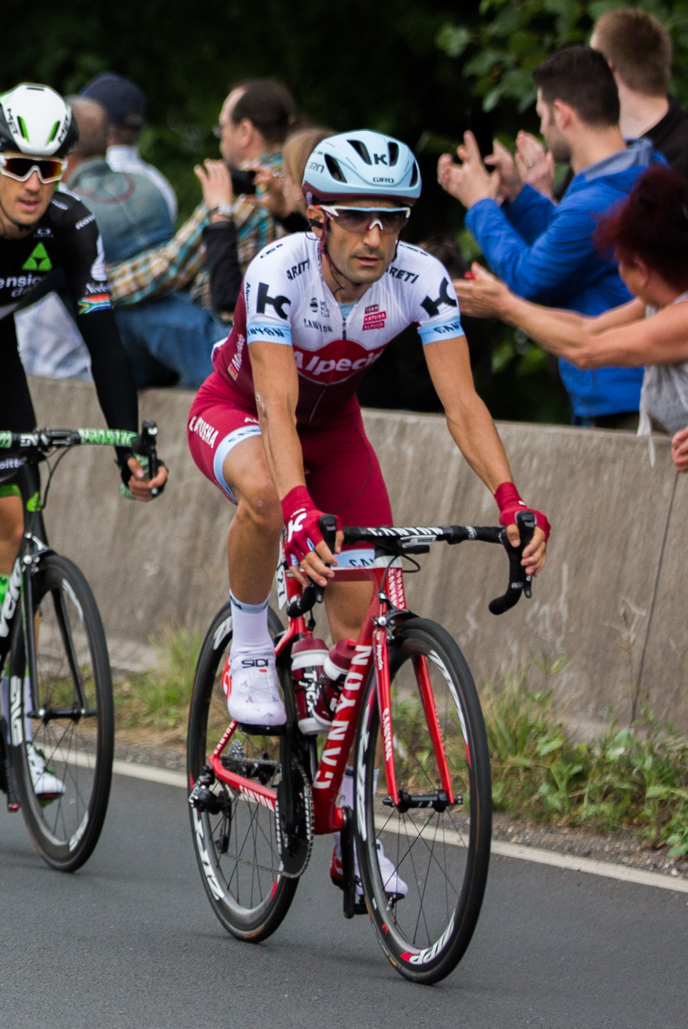 Die zweite Etappe der Tour de France 2017 durch Neuss